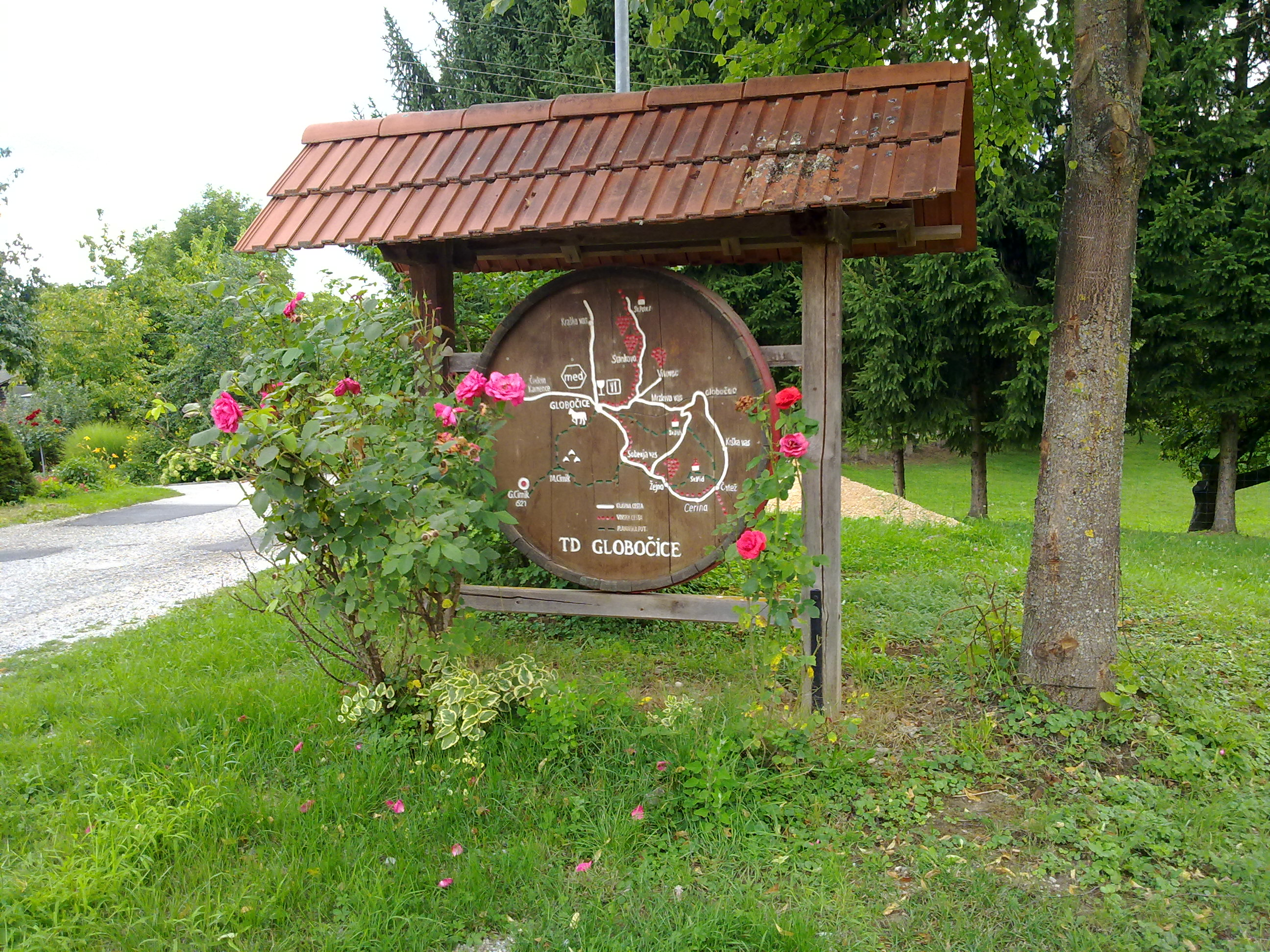 Centro Globocice - Slovenia